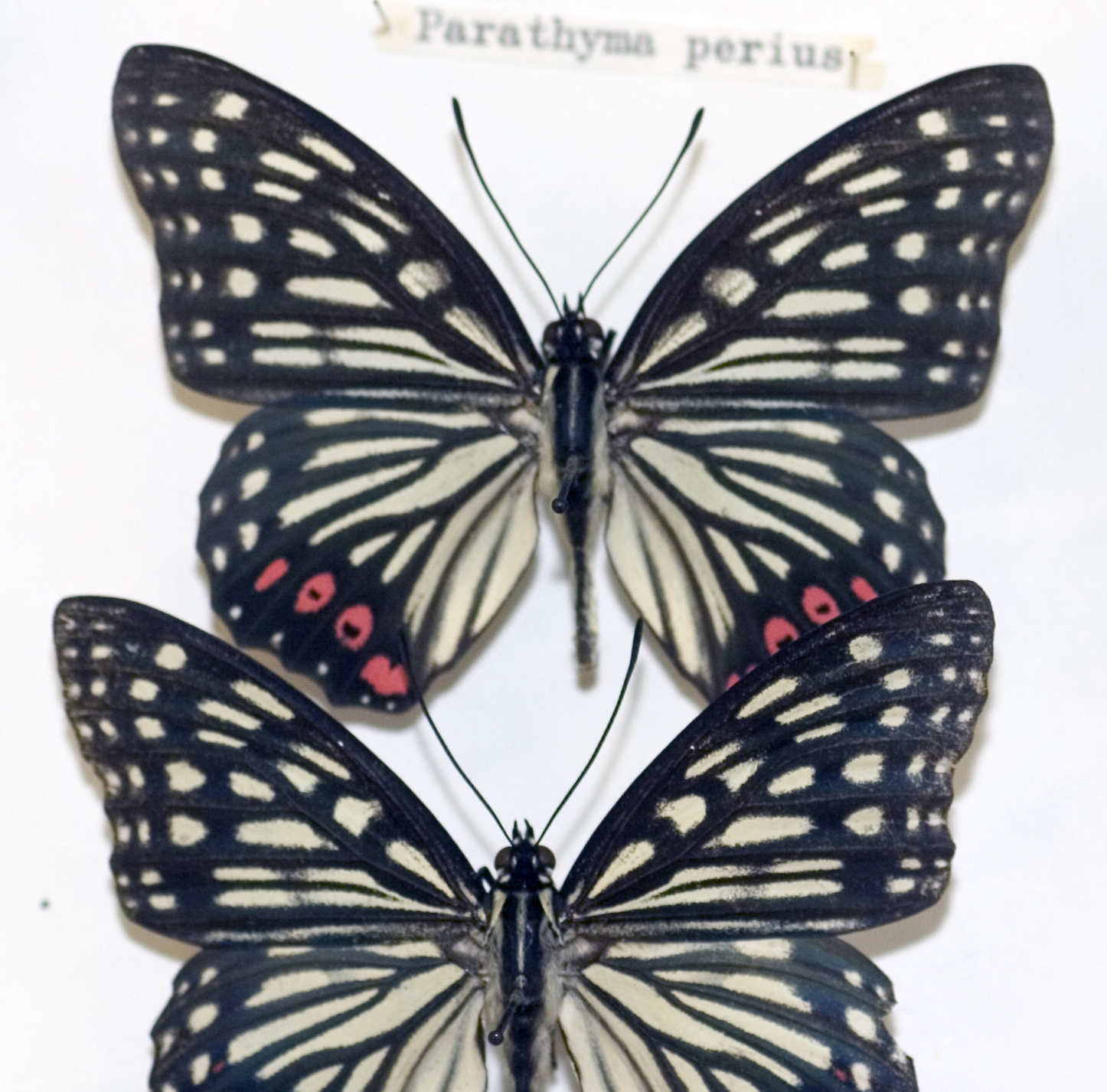 Hestina assimilis forma assimilis Museum Specimens